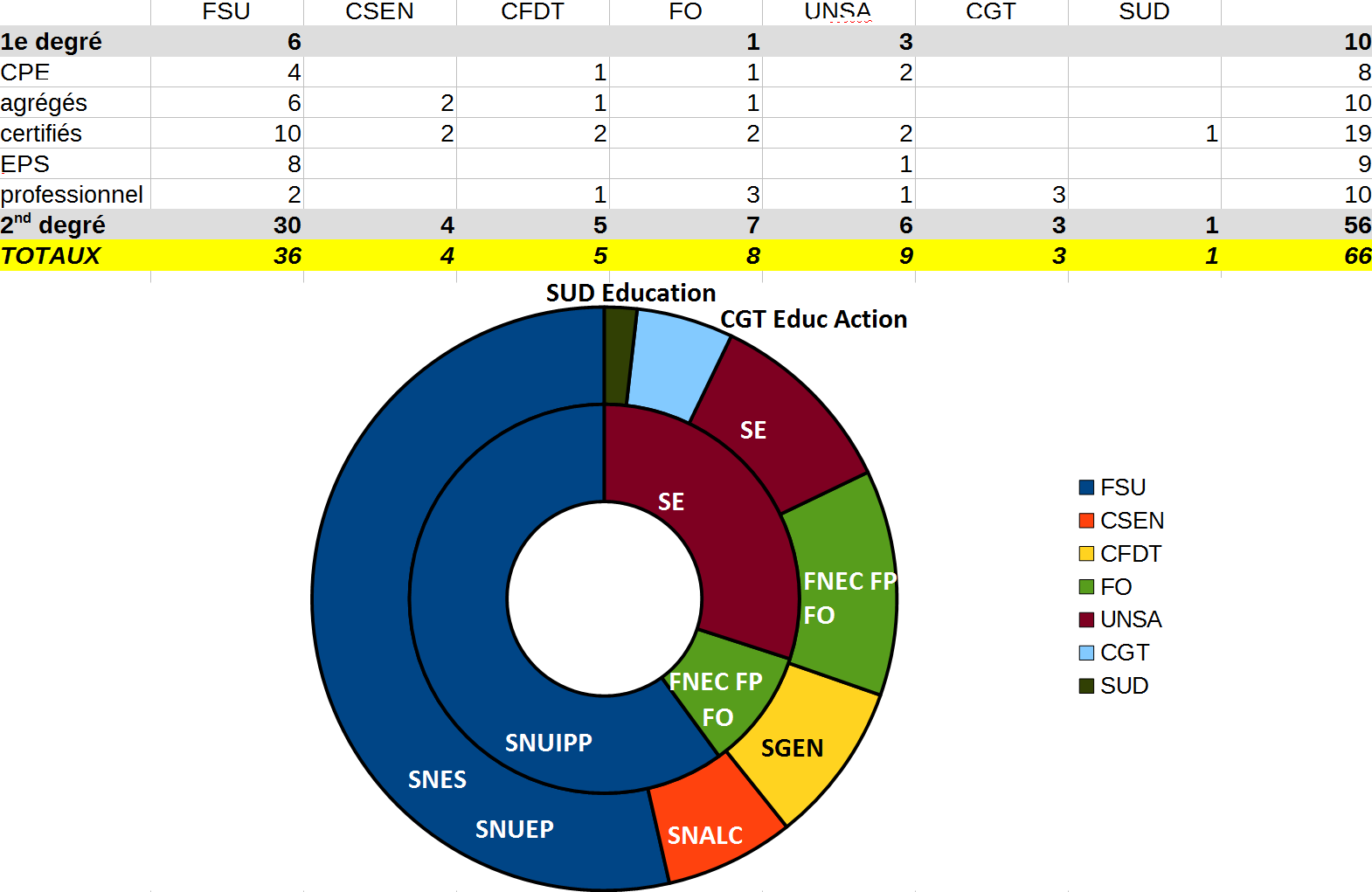 Résultats des élection au CAPN des enseignants du 1e et 2nd degré 2014